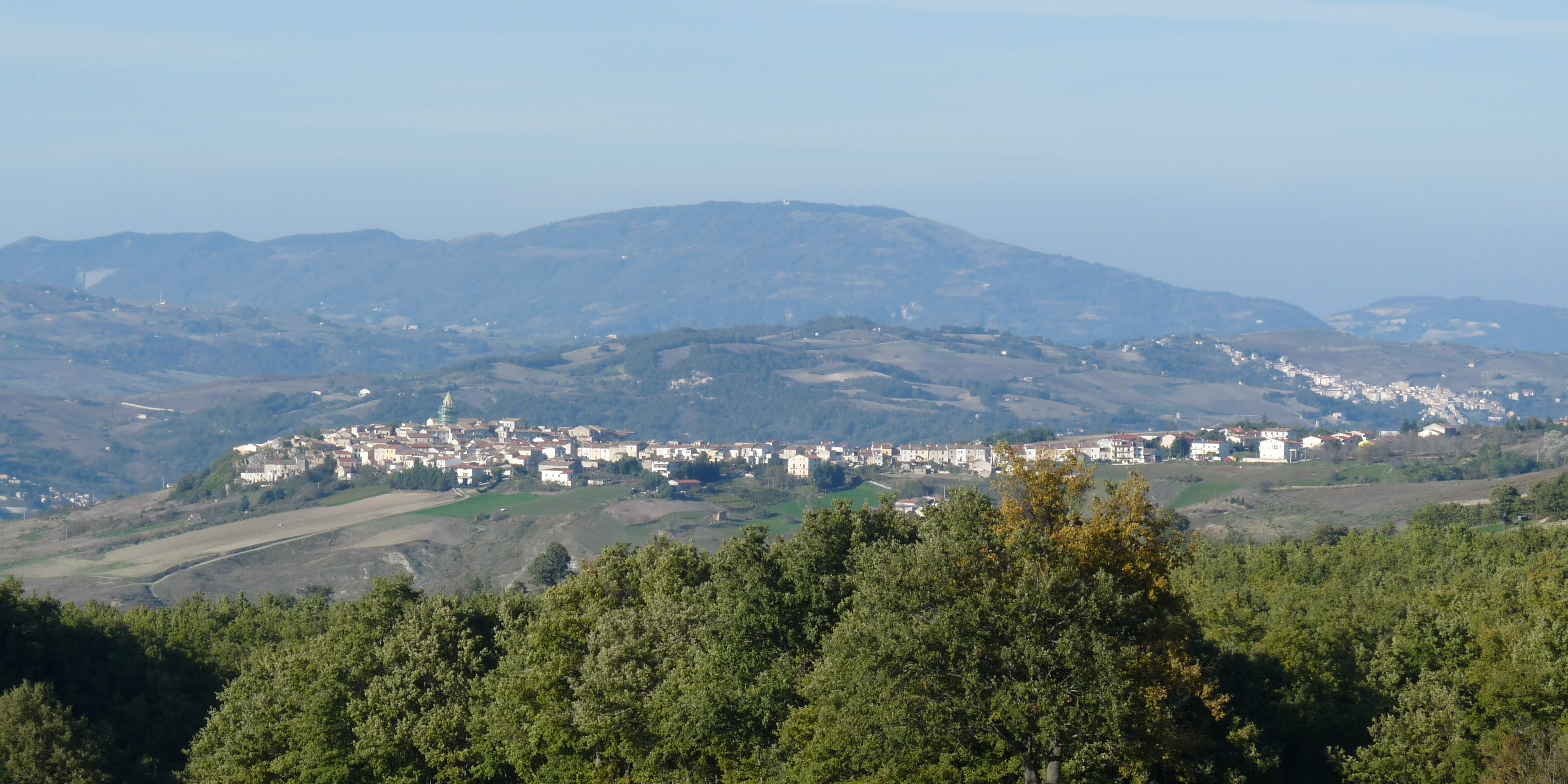 Panorama di Petrella Tifernina, comune molisano in provincia di Campobasso